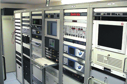 Teknologia berriak euskal hedabideetan.